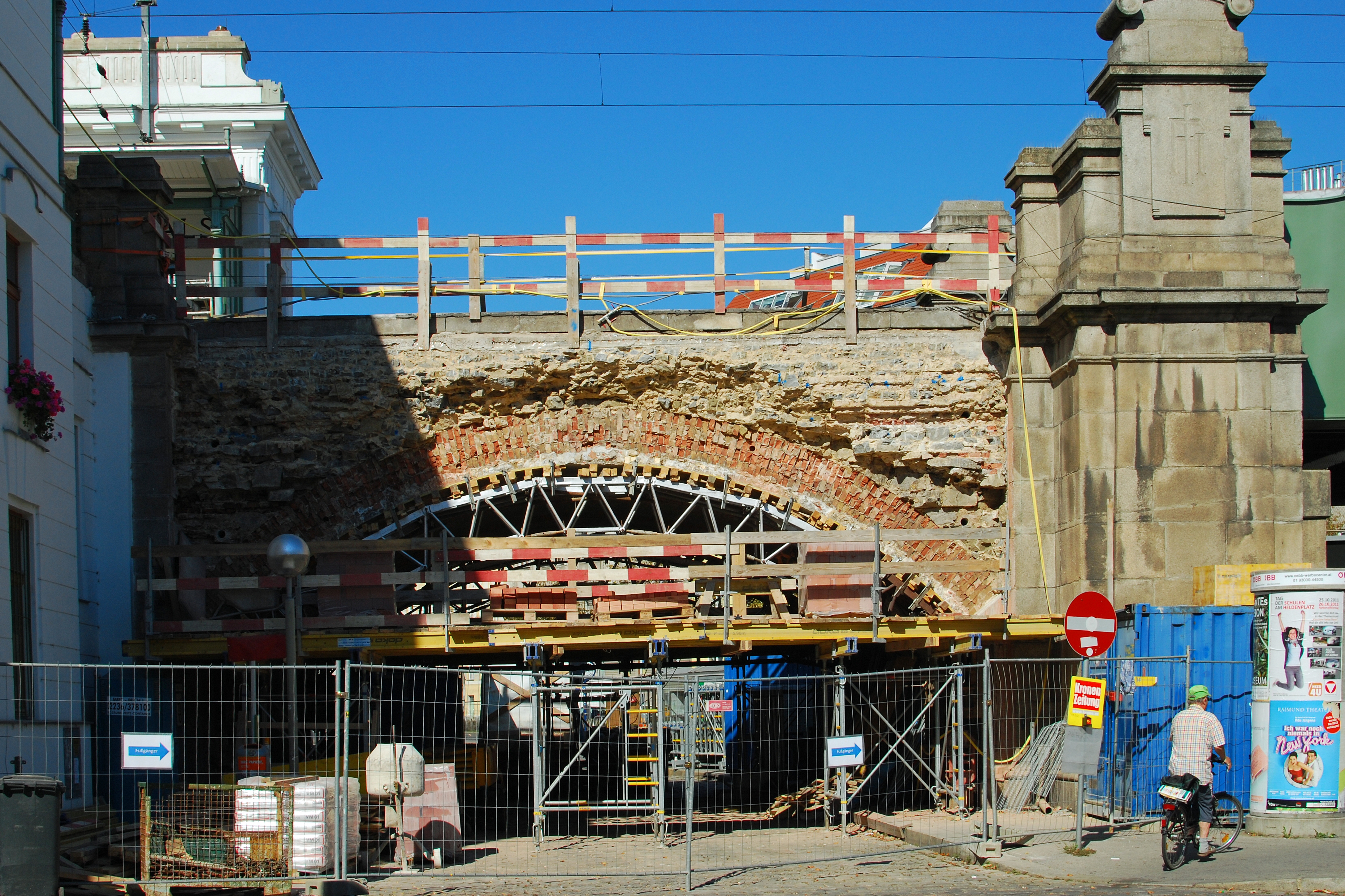 Wiener Vorortelinie - Station Hernals und Gleisabschnitt